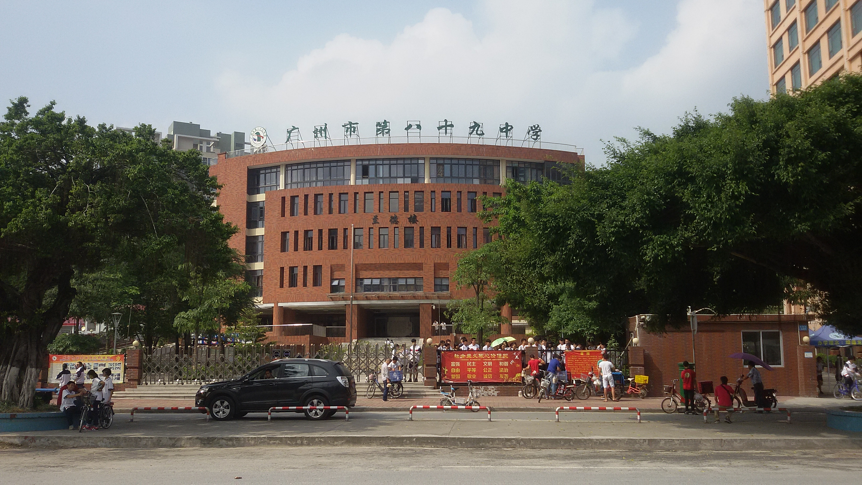 粵語: 广州市第89中学嘅教学楼同正门